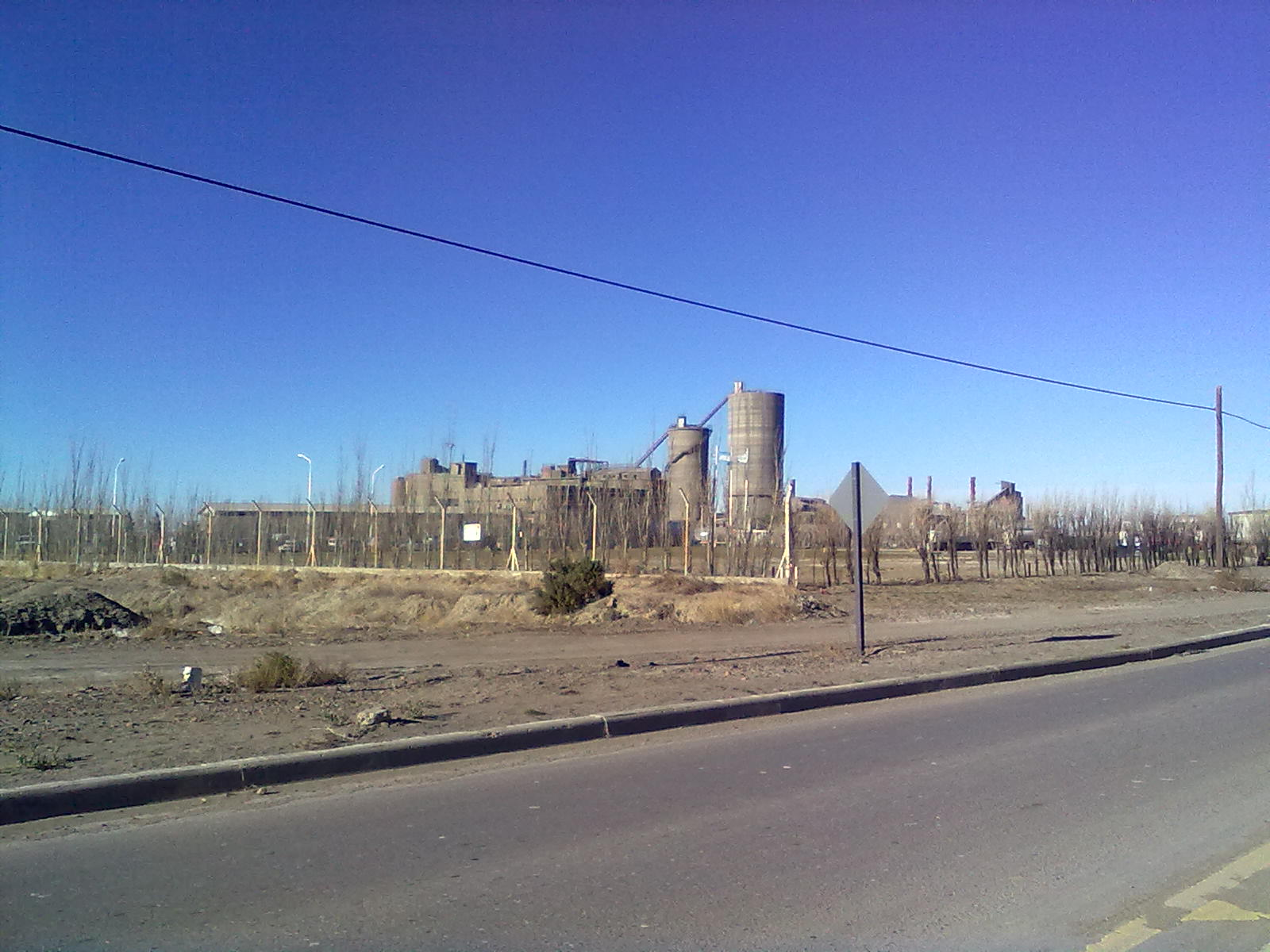 planta cementera en kilometro 8 de comodoro